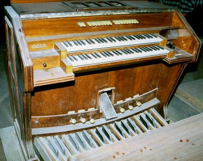 consola del órgano de Santo Domingo de la Calzada